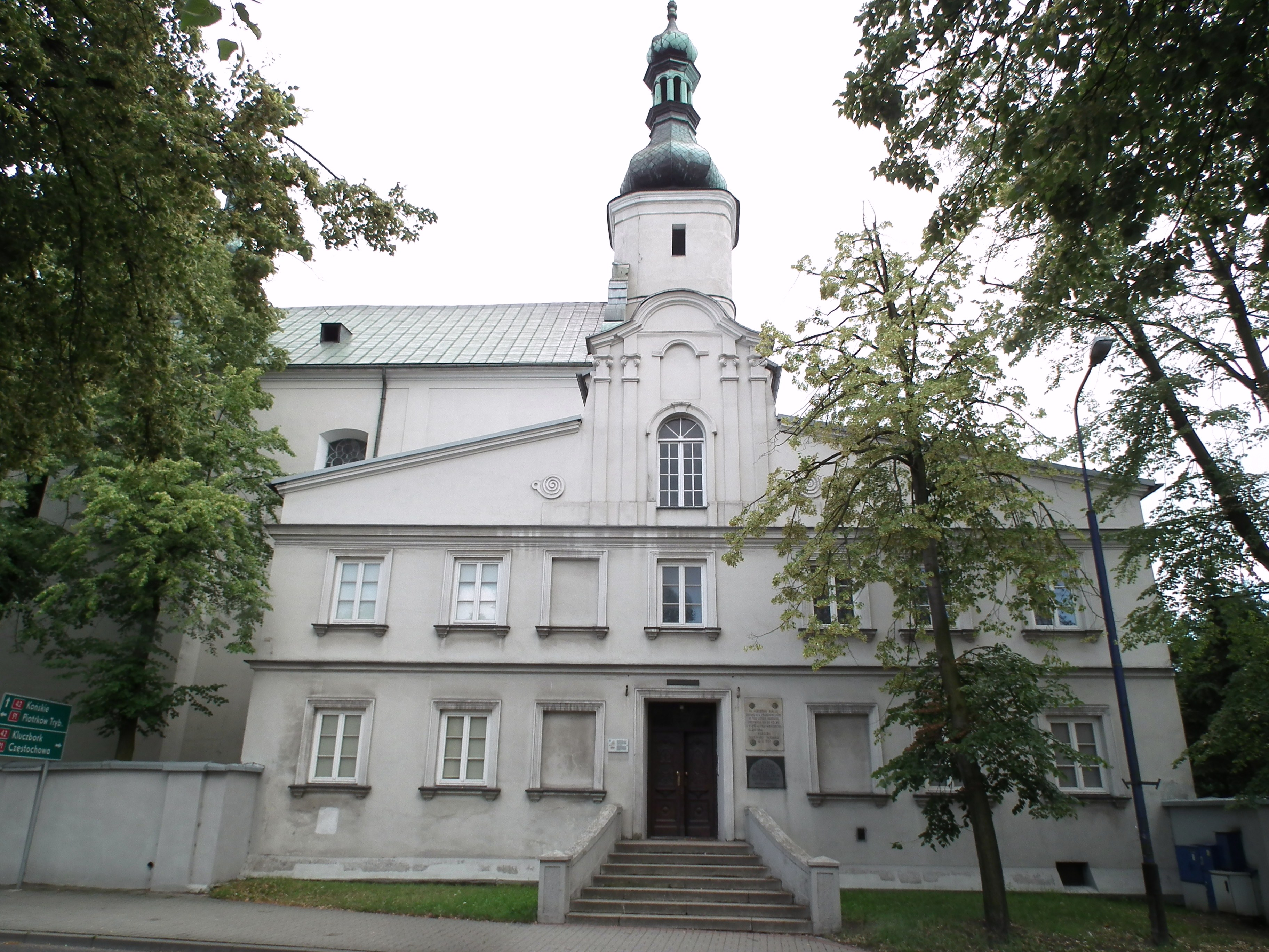 Kościół p.w. Podwyższenia Krzyża Świętego w zespole dawnego Klasztoru oo. Franciszkanów w Radomsku.